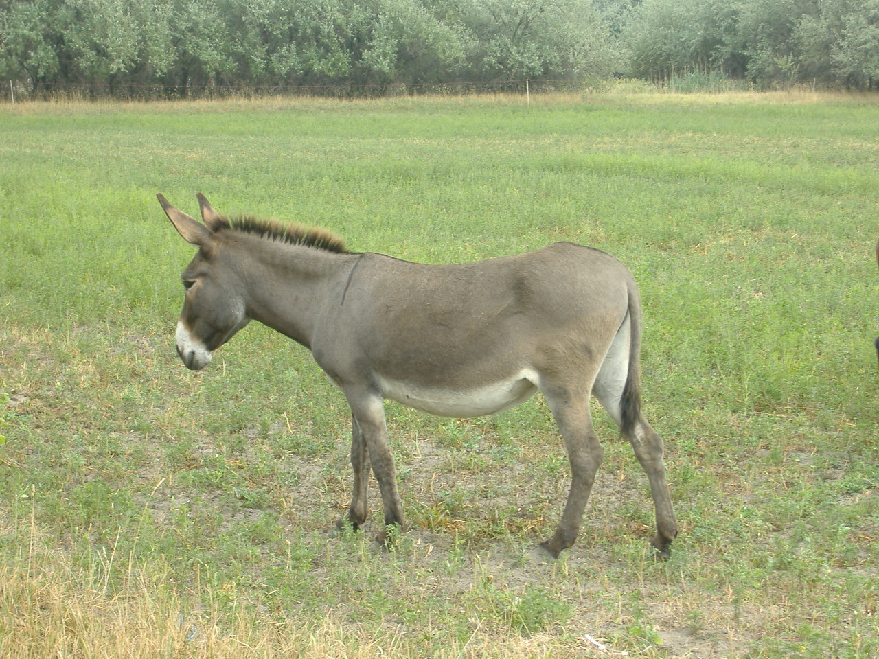 Parlagi szamár (parlag donkey, Parlagesel)